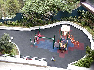 樂翠台任何一座可遠眺遊樂場 Category:香港圖像 Category:樂翠台 Category:跑馬地圖像